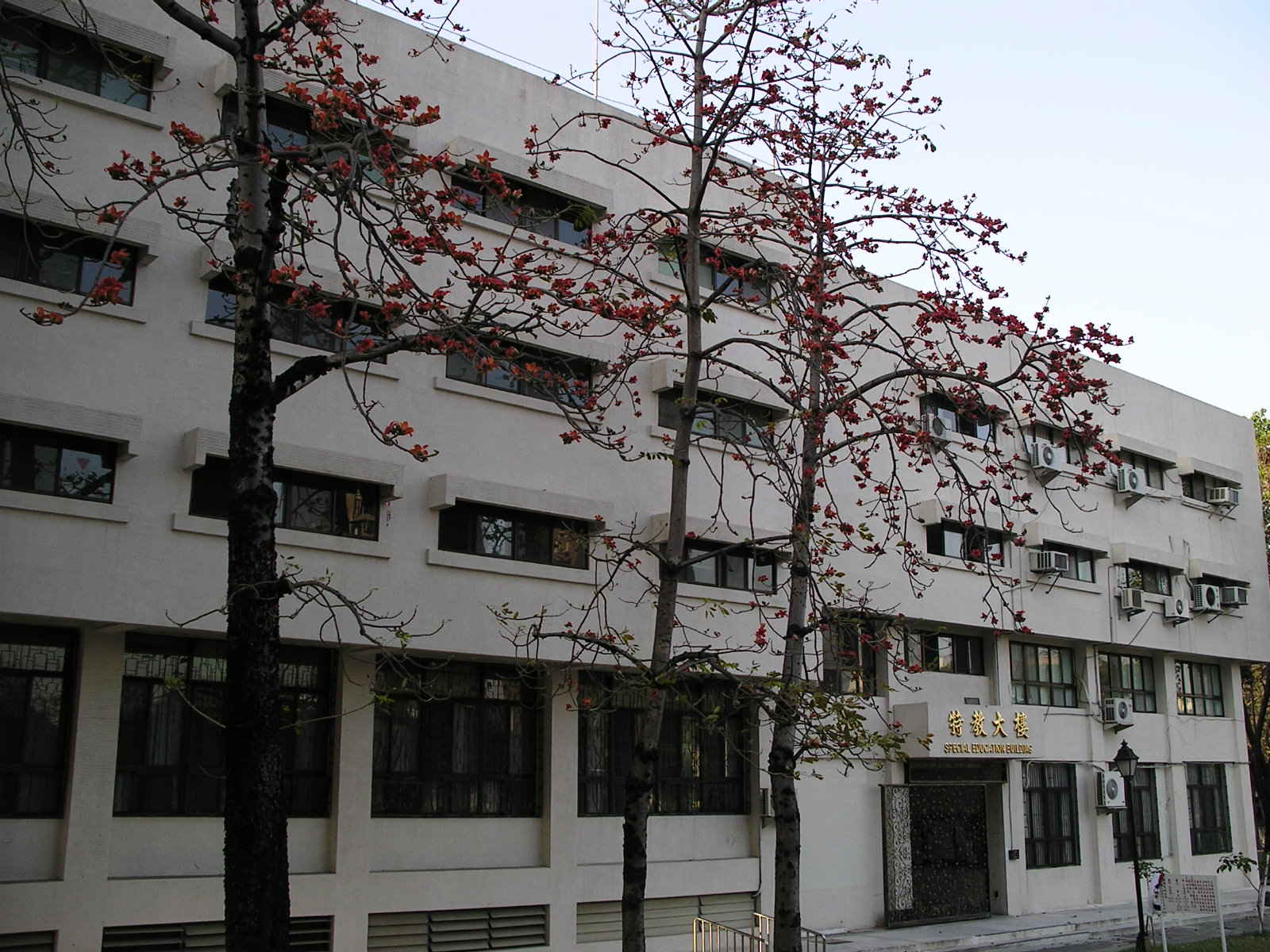 中文（台灣）: 國立高雄師範大學特殊教育系館